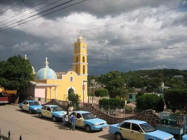 este es iglecia central de tulcingo del valle